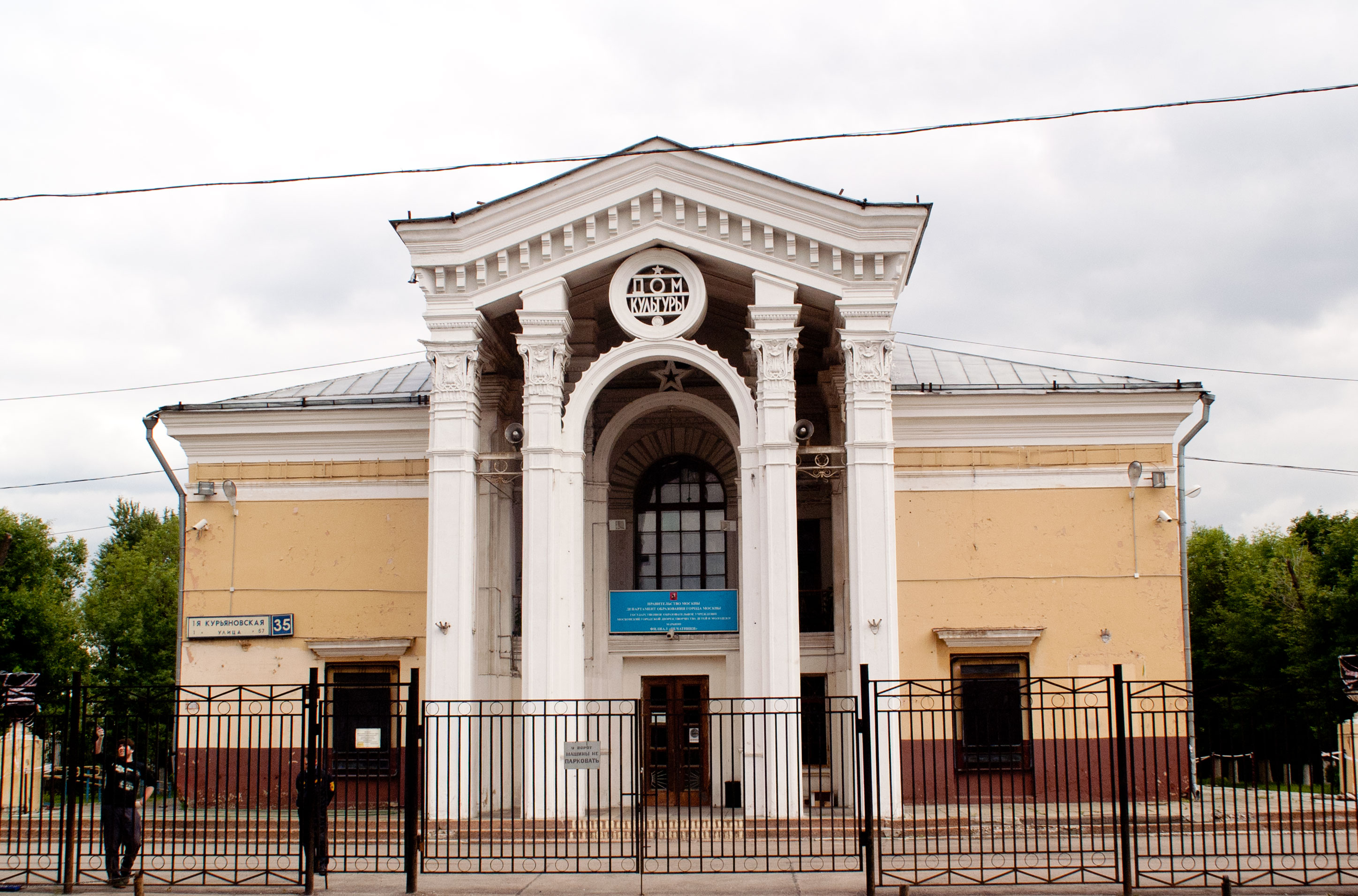 Первая Курьяновская улица (Москва) ДК